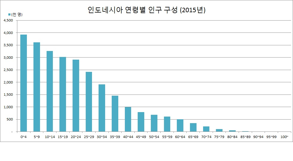 조선말: picture